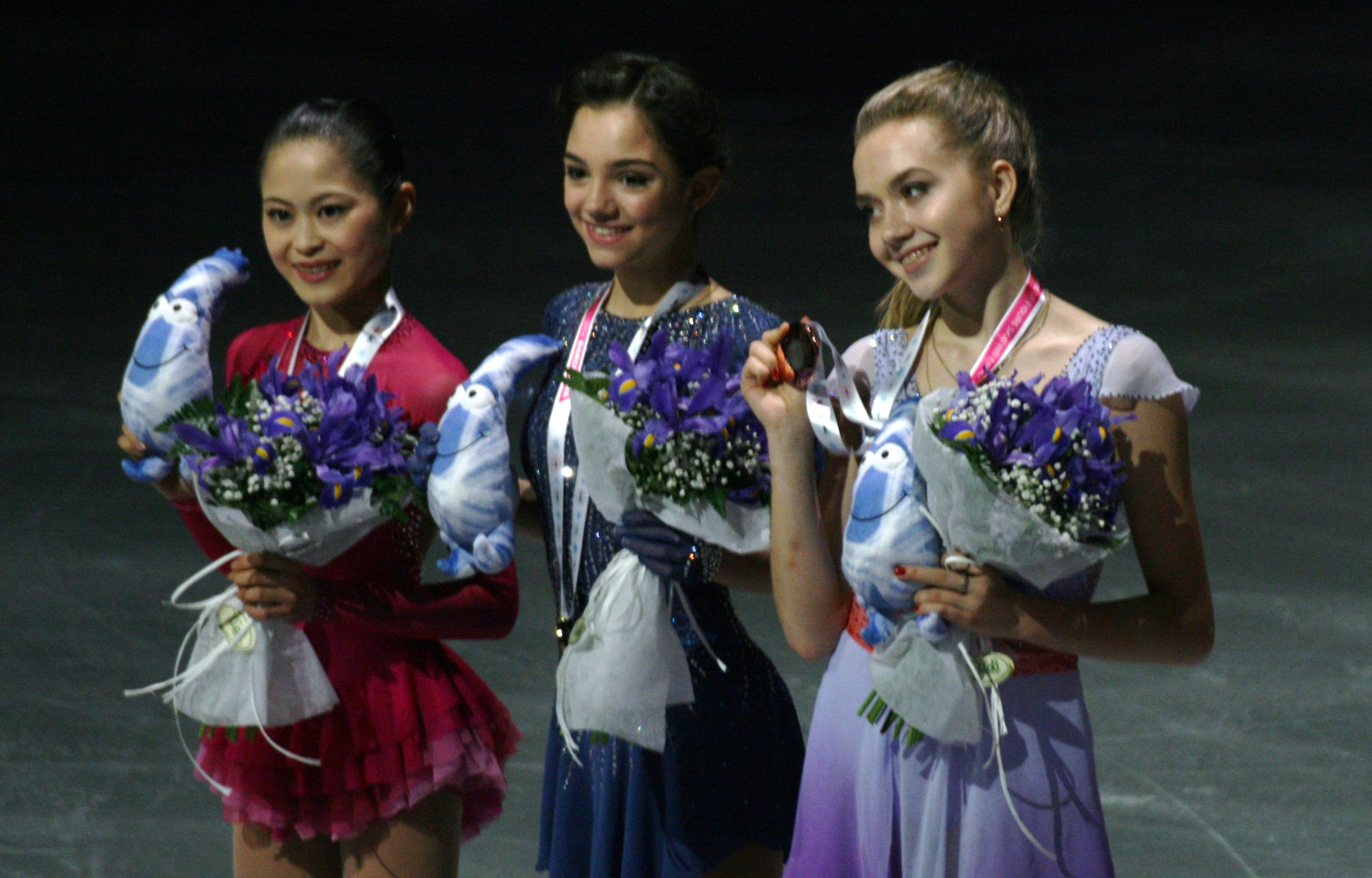 Церемония награждения в женском одиночном катании на финале Гран-при по фигурному катанию 2015-2016. Слева на право: Сатоко Мияхара (Япония) - 2е место, Евгения Медведева (Россия) - 1е место, Елена Радионова (Россия) - 3е место.